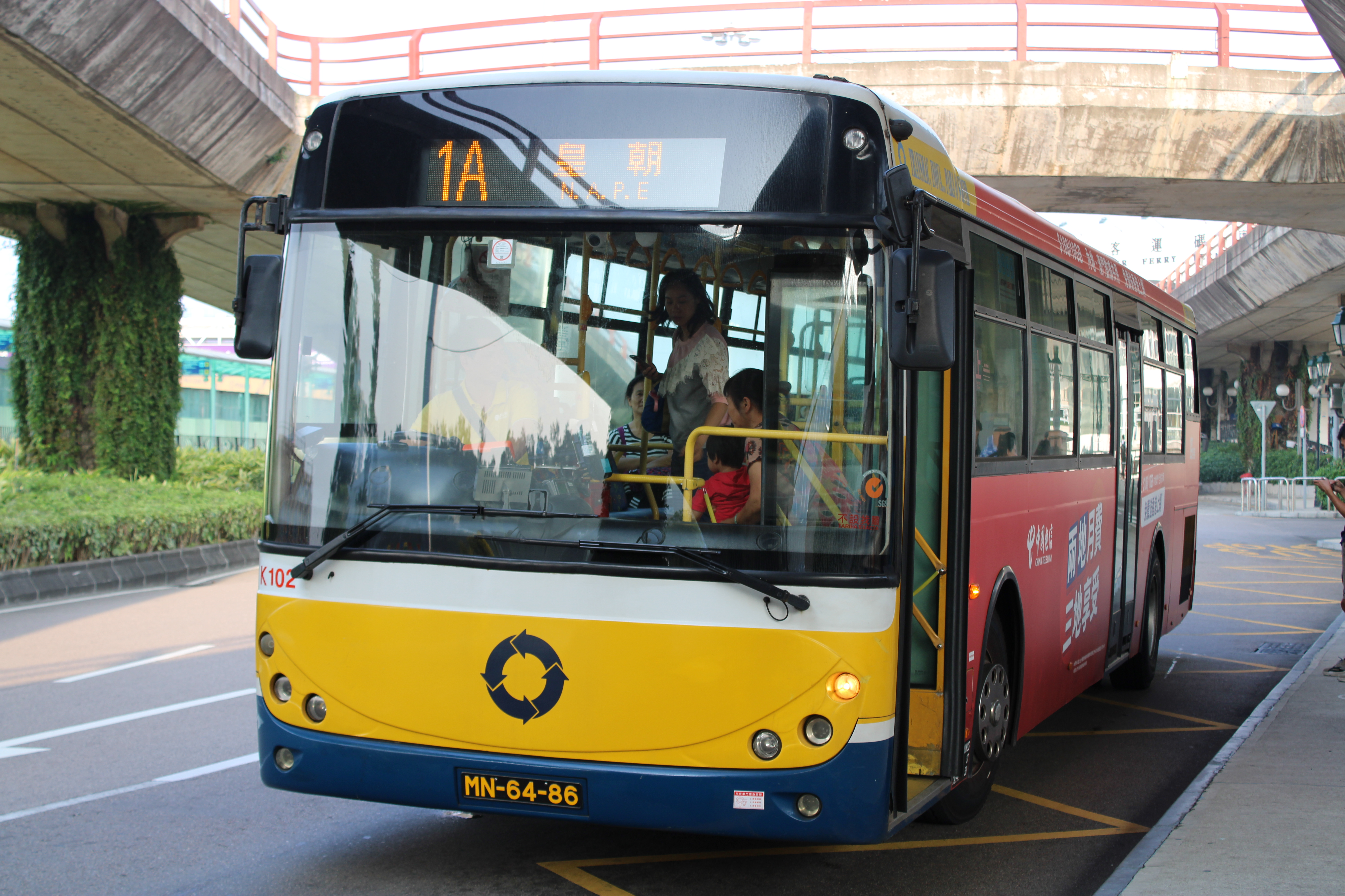 新福利蘇州金龍KLQ6126G行駛1A路線。